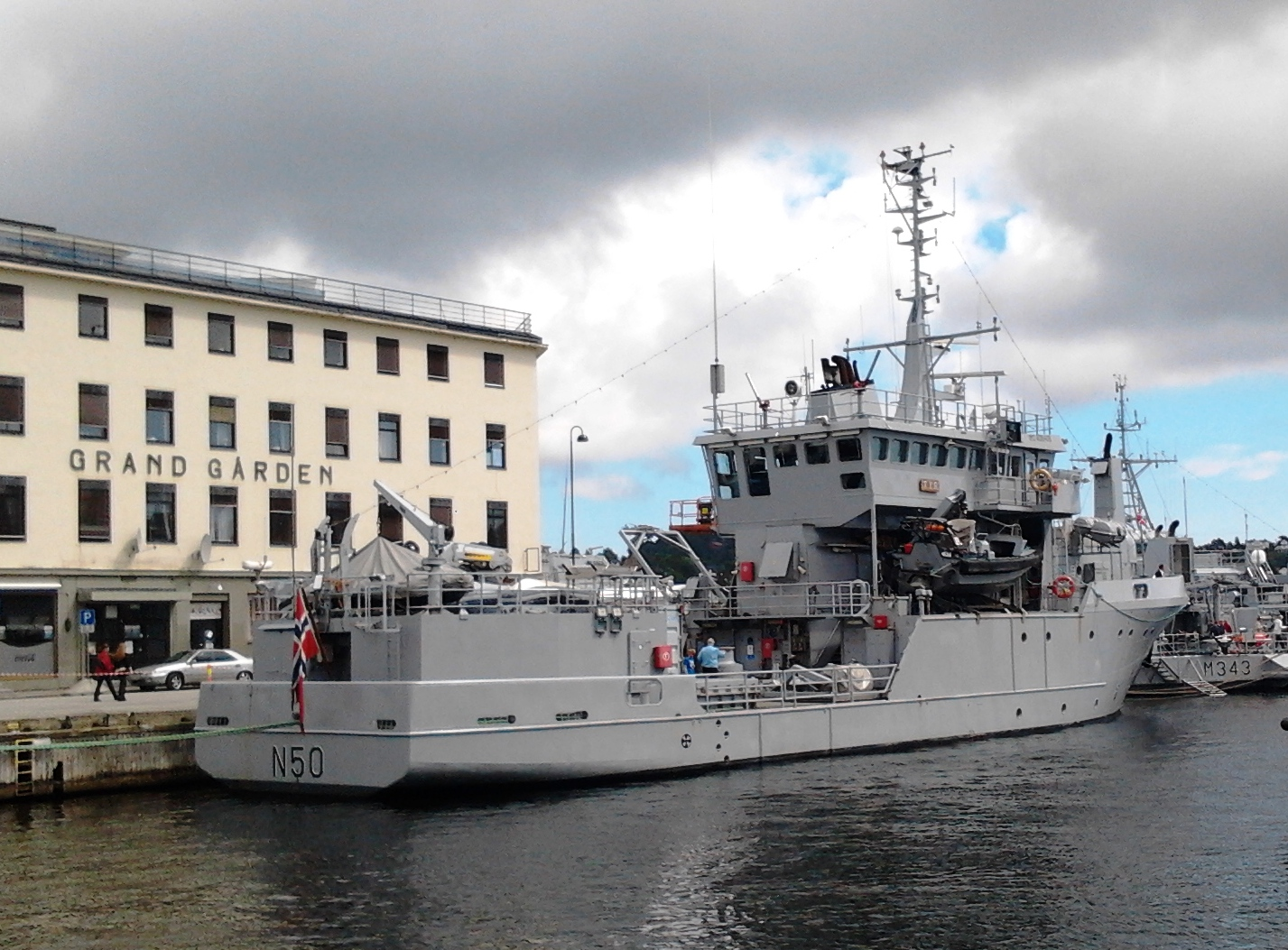 Det norske minekontrollfartøyet KNM «Tyr» (N50)